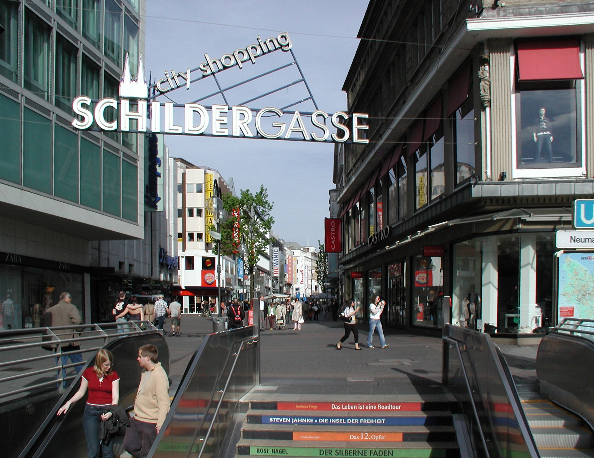 Köln Neumarkt, Eingang zur Schildergasse